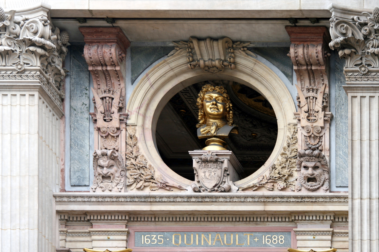 Statue de Philippe Quinault sur l'opéra Garnier à Paris